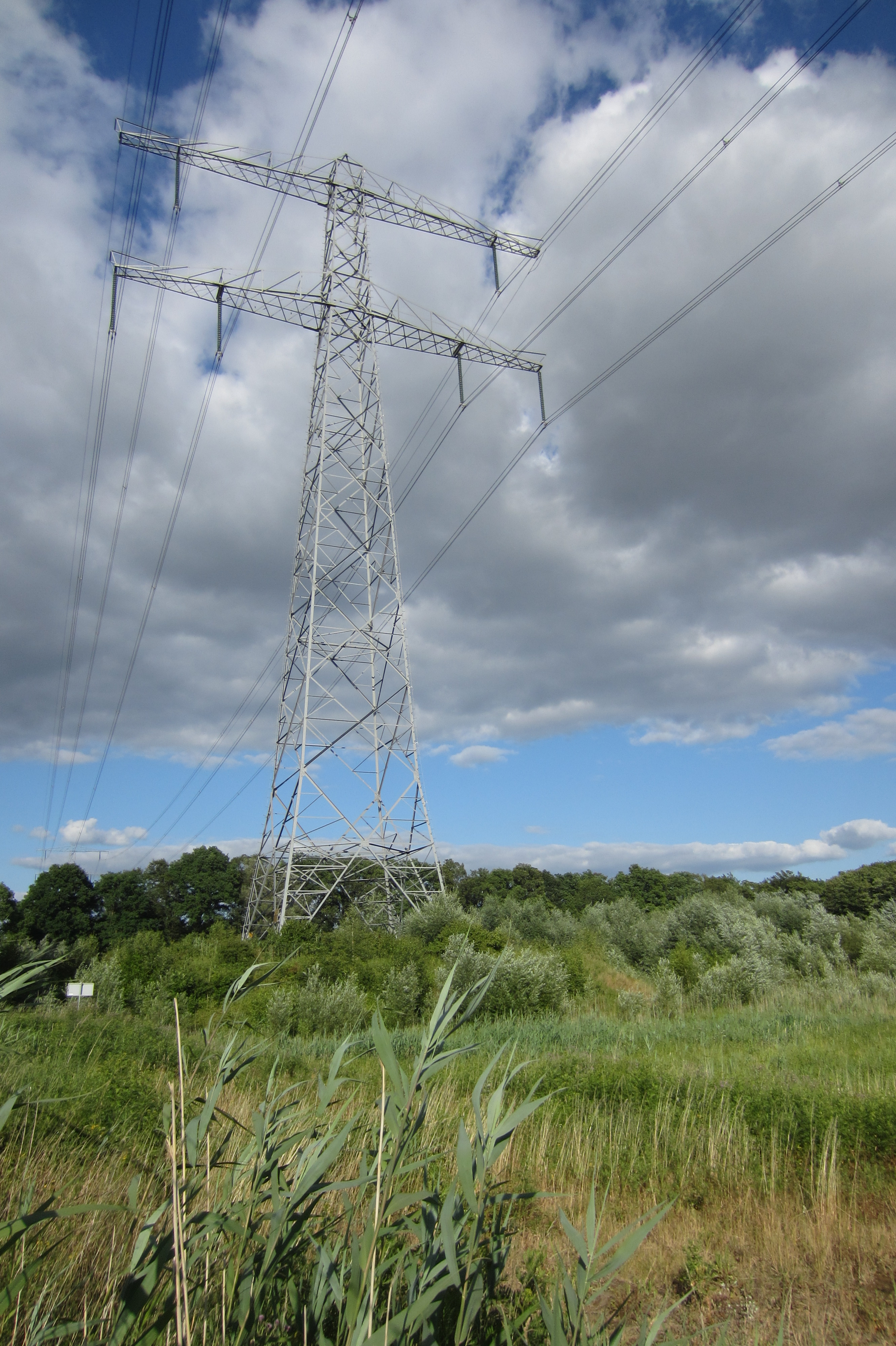 Hoogspanningsmast in Kerspel Goor, nabij het Twentekanaal.